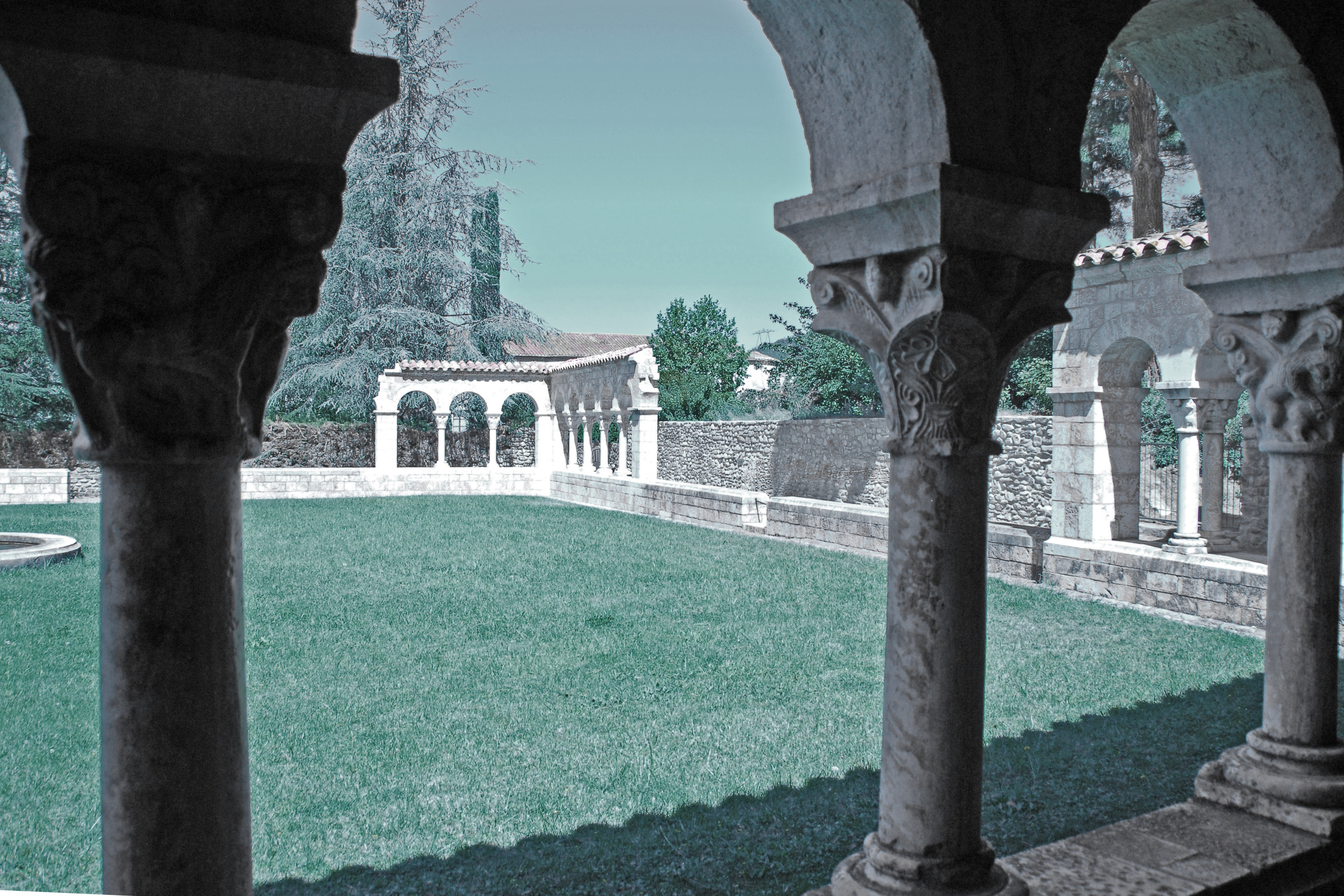 Abbaye Michel-de-Cuxa, Kreuzgang, nördl. Ecke